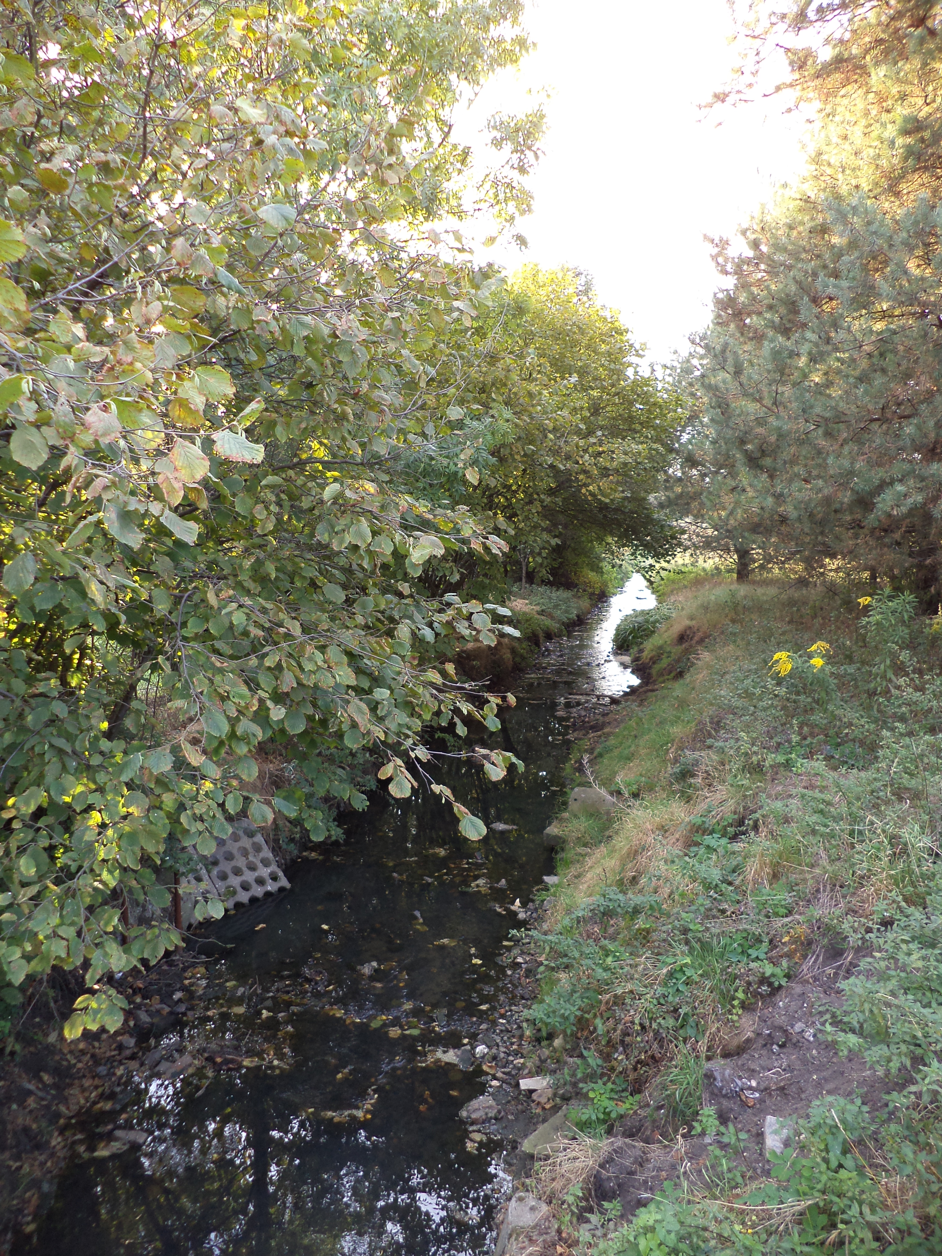 Rzeka Stoła przepływająca przez Sowice - dzielnicę Tarnowskich Gór